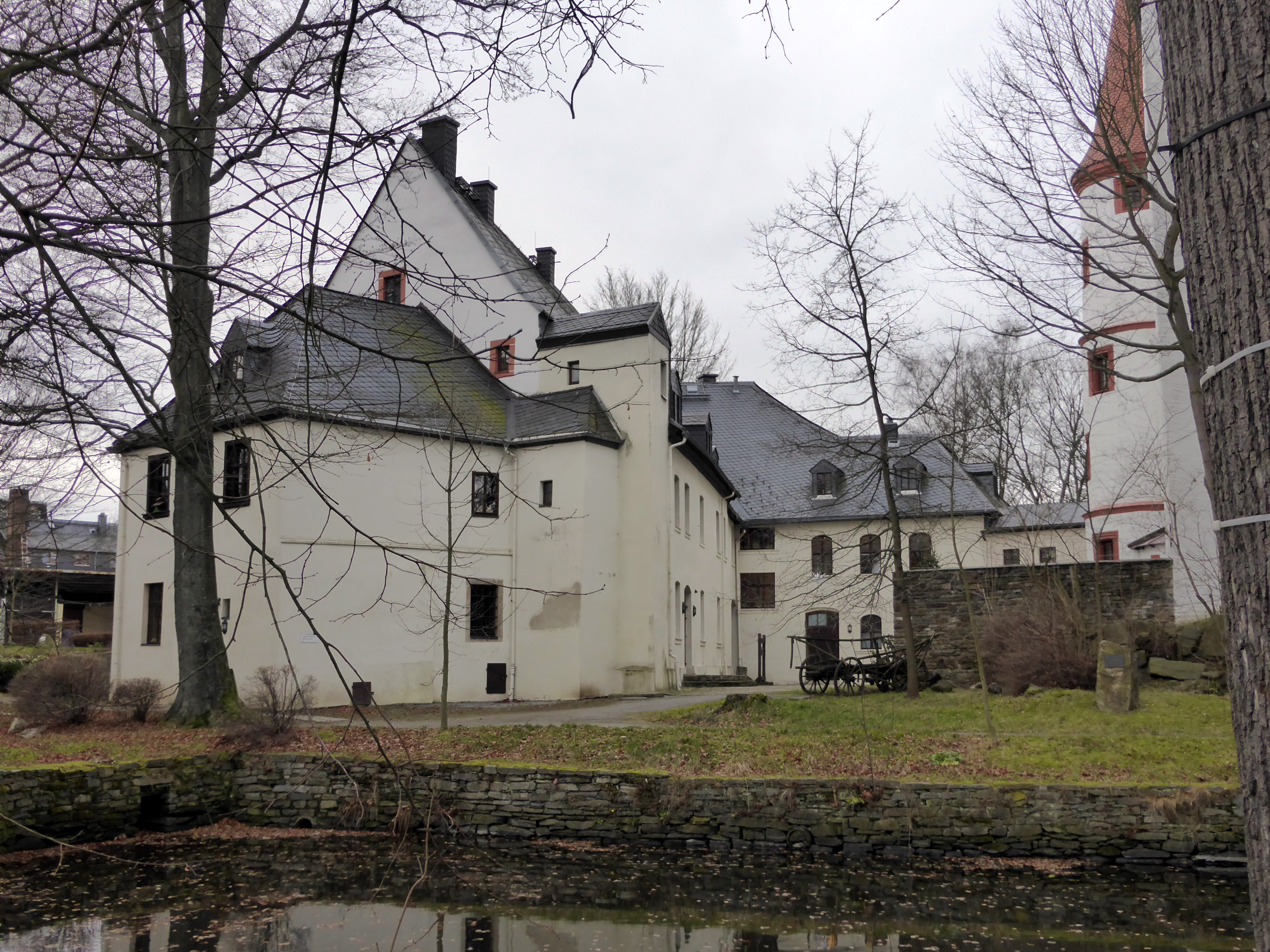 Schloss Schlettau - Schlettau, Erzgebirgskreis - Sachsen.